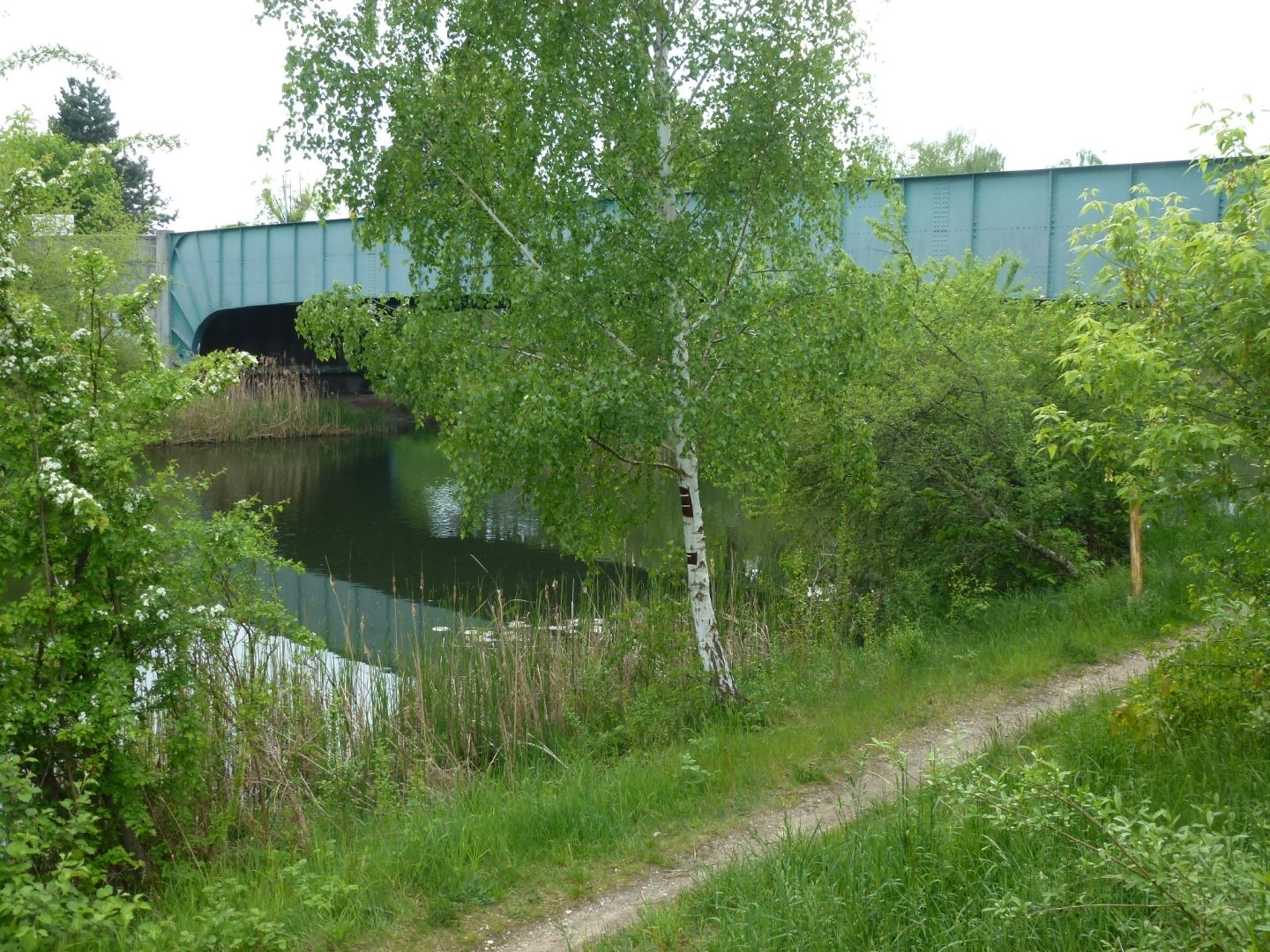 Kanalbrücke bei Burghausen